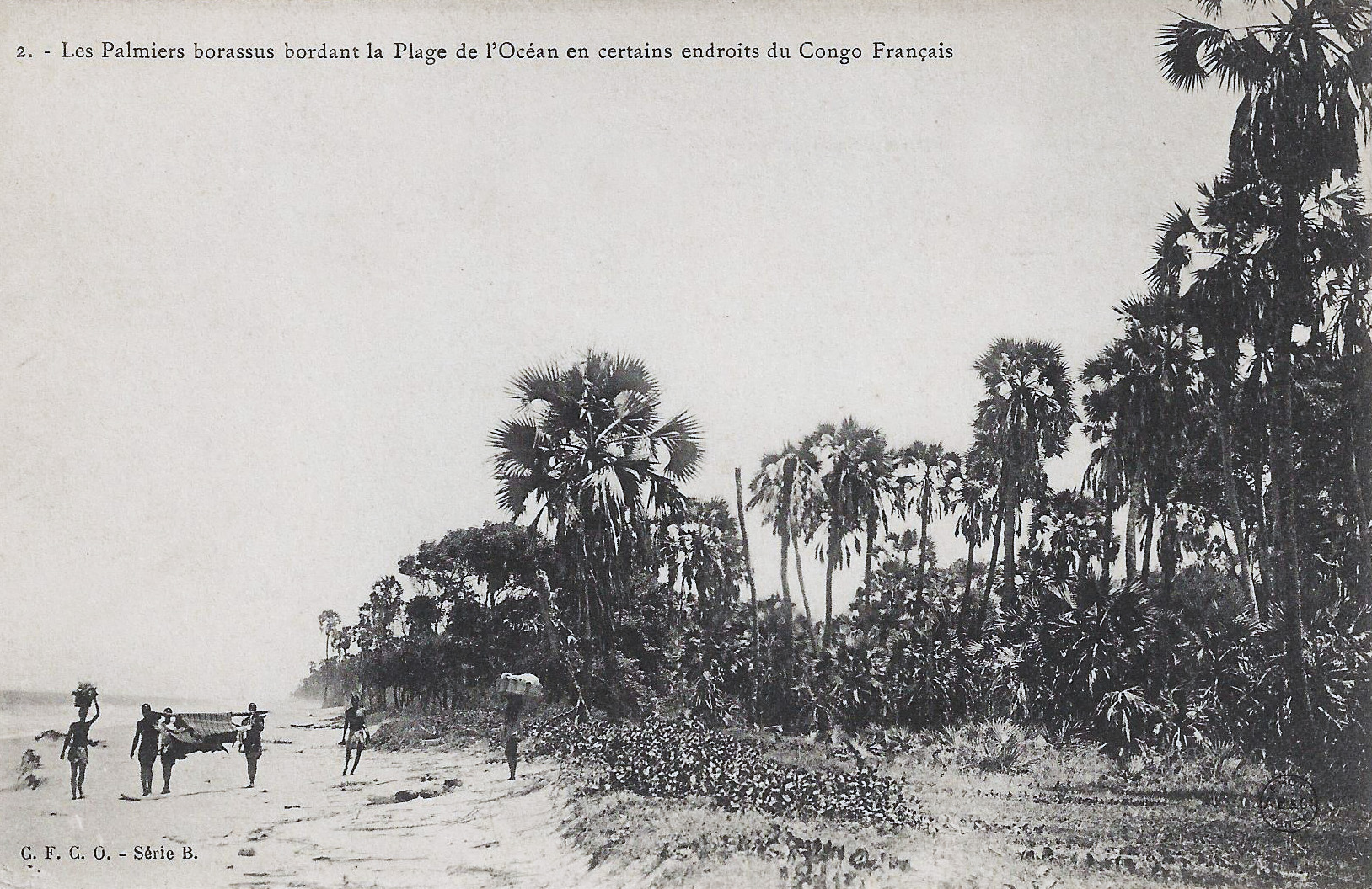 Les palmiers borassus bordant la Plage de l'Océan en certains endroits du Congo Français). Phot. A.B. & Cie, Nancy [Albert Bergeret] C.F.C.O., série B